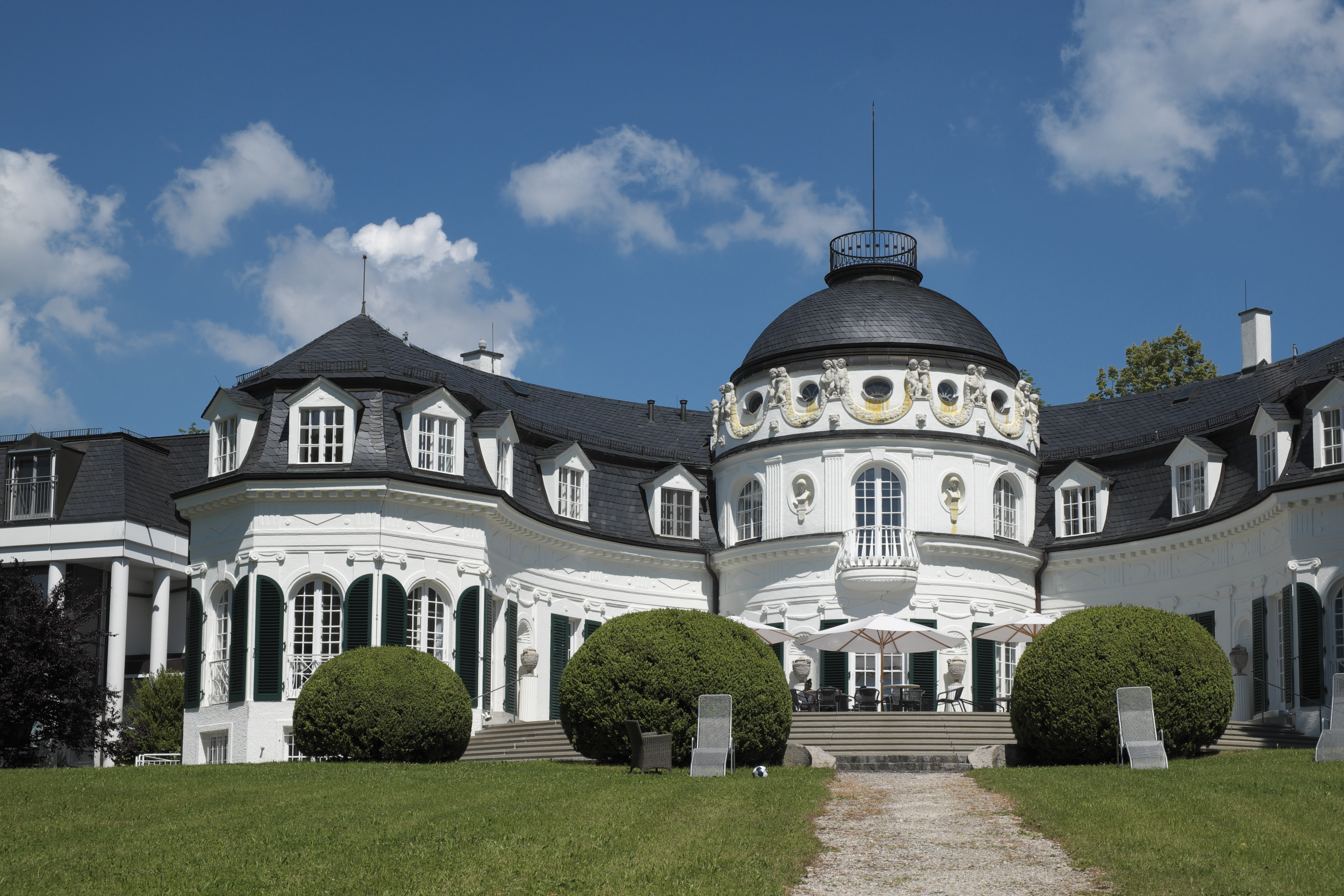 Ehemalige Villa, jetzt Klinik, in Kempfenhausen, einem Ortsteil der Gemeinde Berg im Landkreis Starnberg (Bayern/Deutschland)